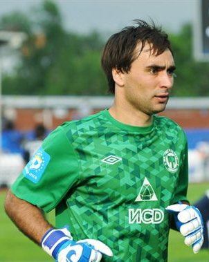 Юрій Паньків - український футболіст, воротар. Під час виступів за Металург (Донецьк).